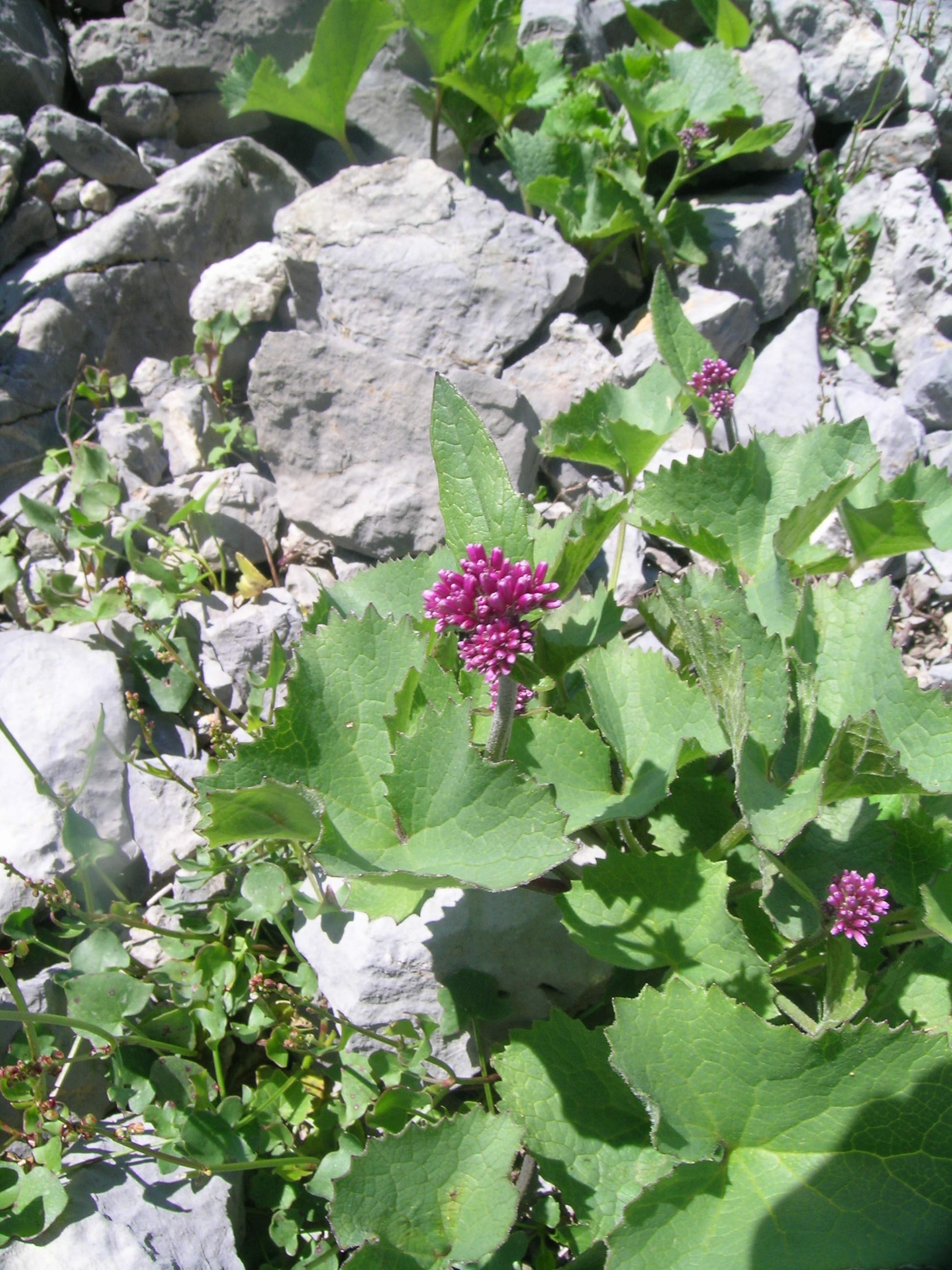 Adenostyles glabra, Schynige Platte, Kanton Bern, Schweiz